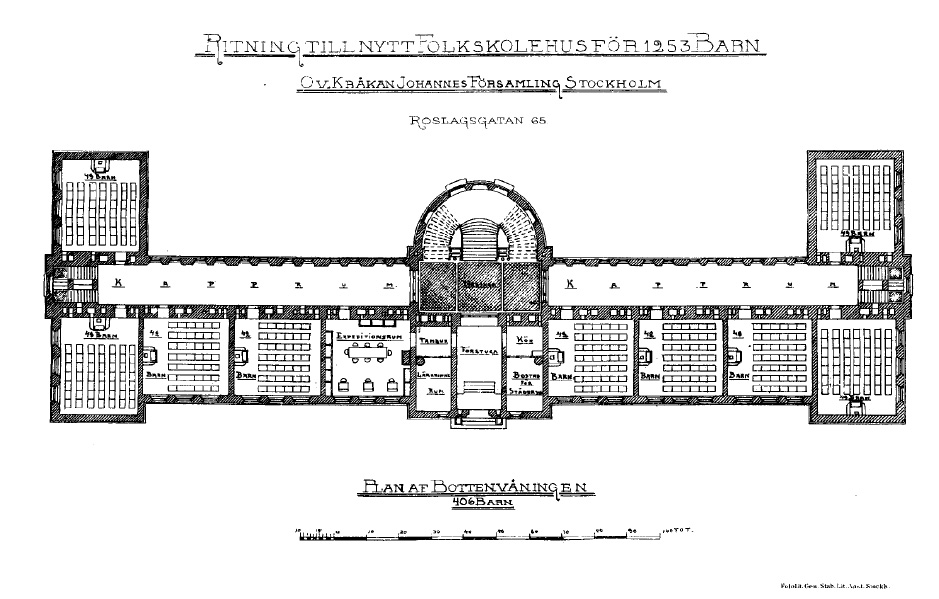 Johannes skola, Roslagsgatan 61 kv. Kråkan 8. Byggnadsår 1890-91. Arkitekt Carl Möller